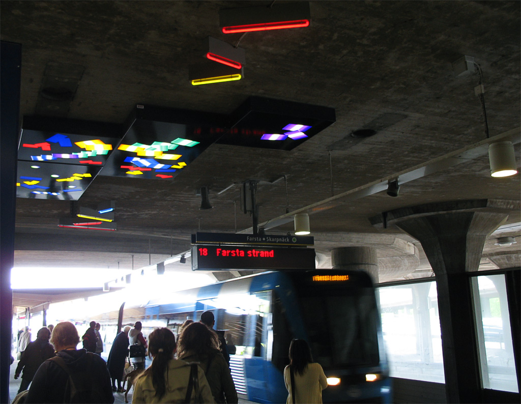 Gullmarsplan Metro station.